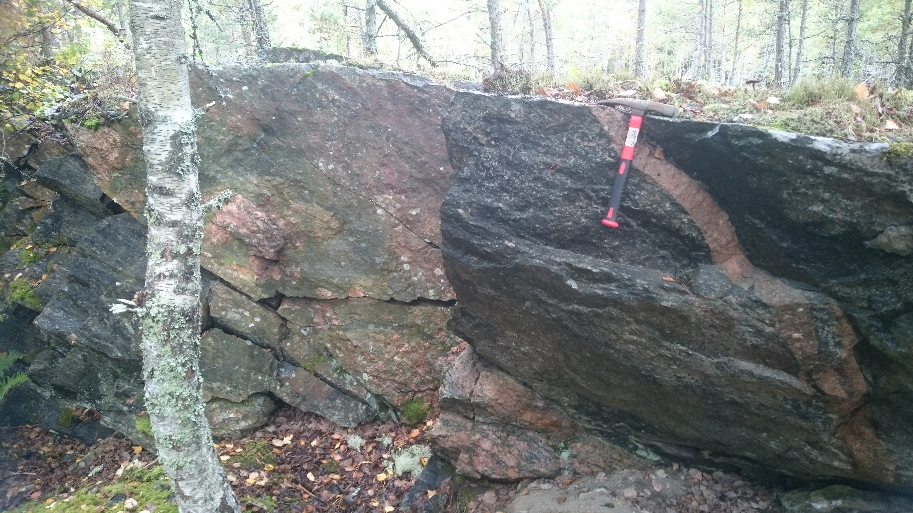 Del av bergväggen mot norr vid den igenfyllna delen av Huddinge Gruva (59°11′28.8″N 17°56′38.6″Ö)